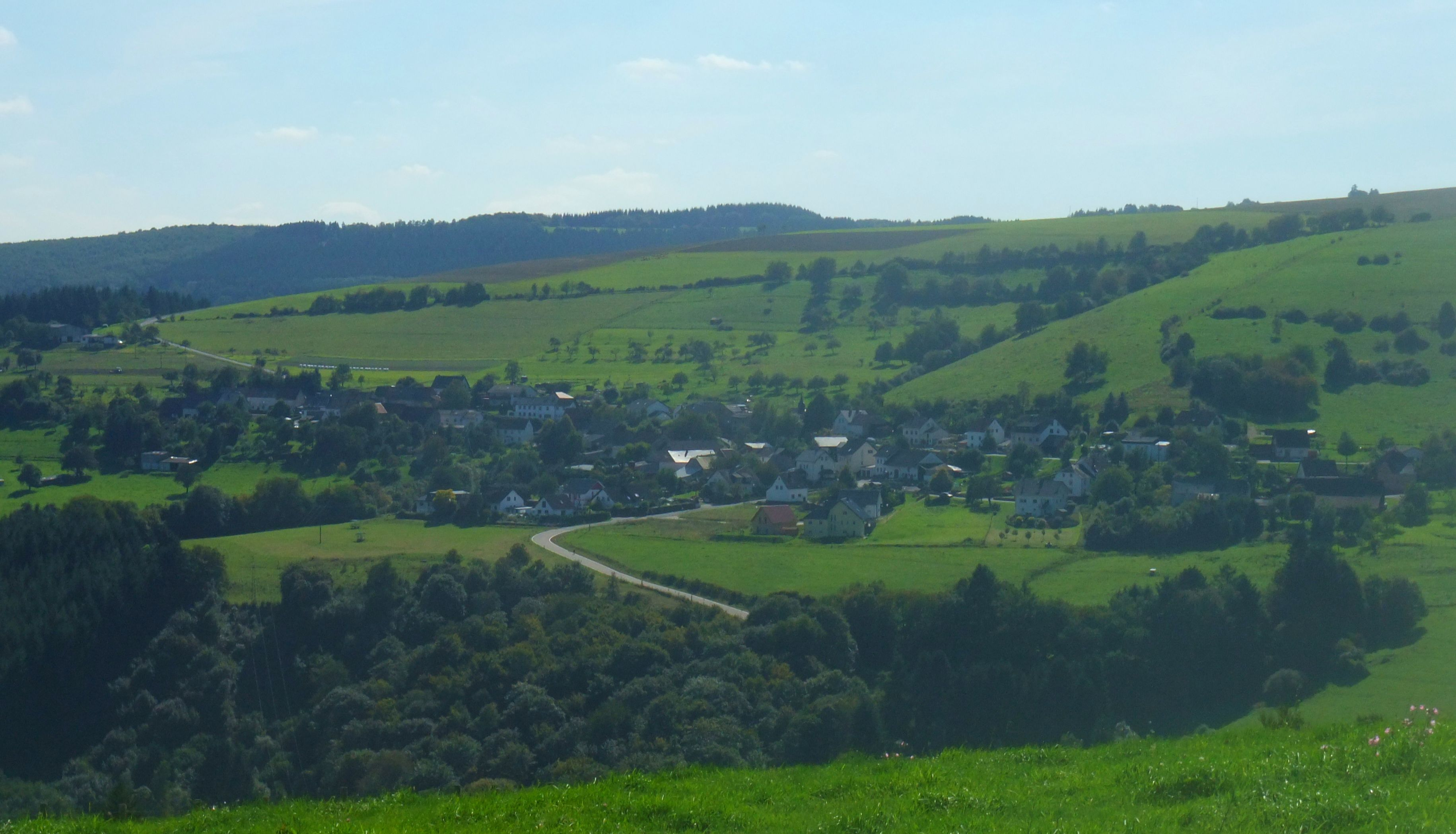 Ollmuth